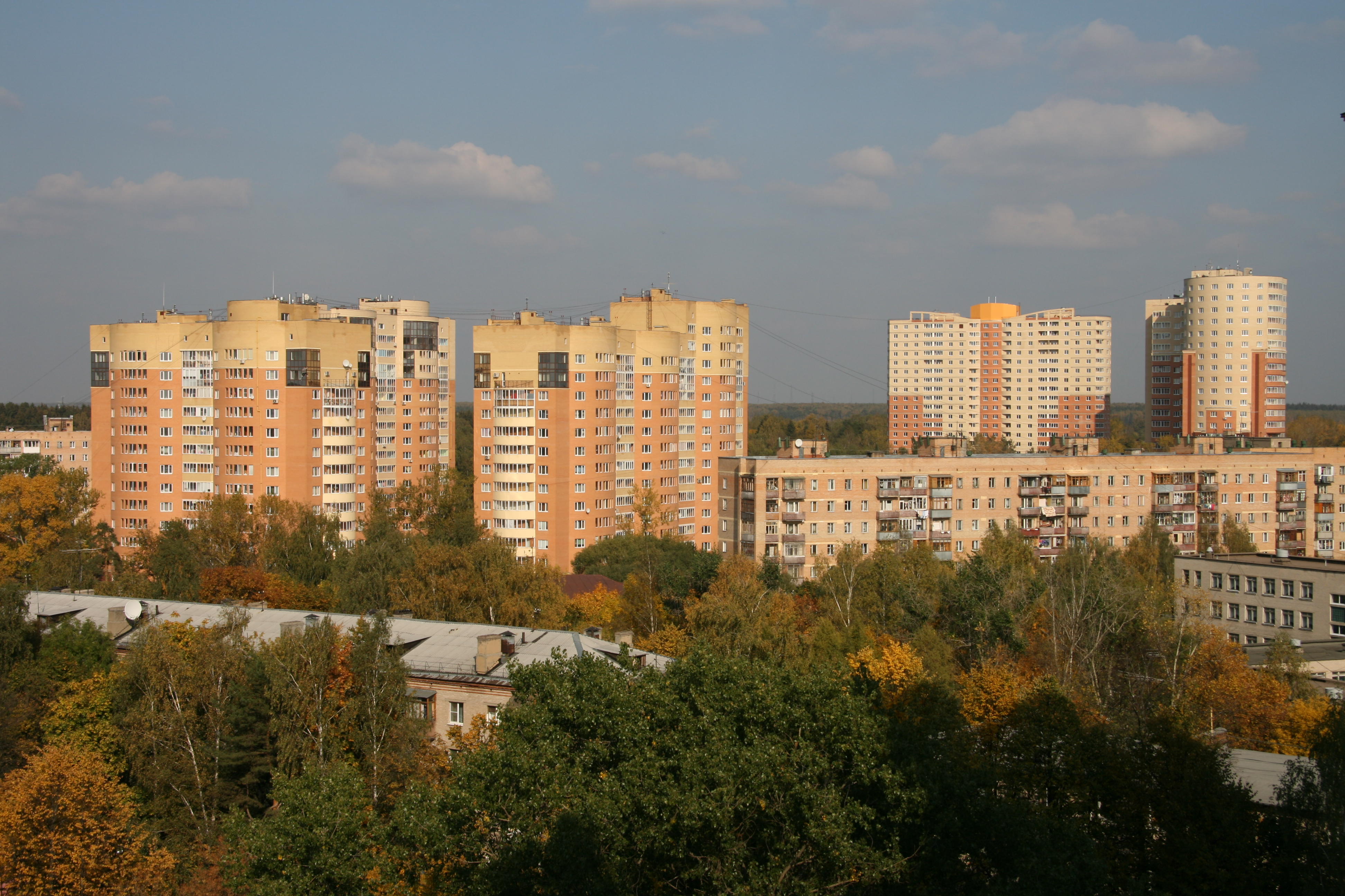 Новостройки г.Пушкино